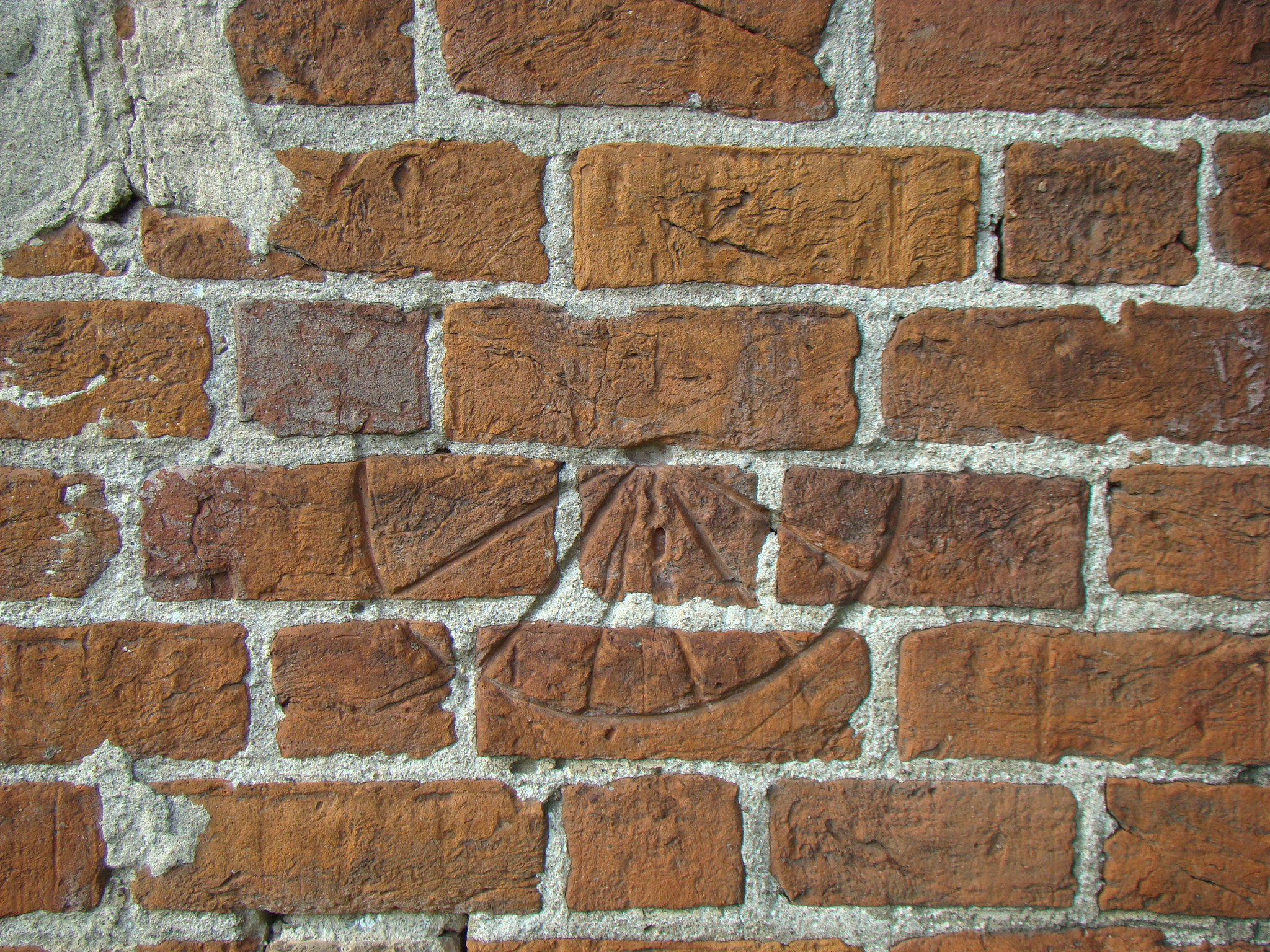 Sonnenuhr an der Kirche von Dahmen. Foto: Peter Schmelzle, August 2011.